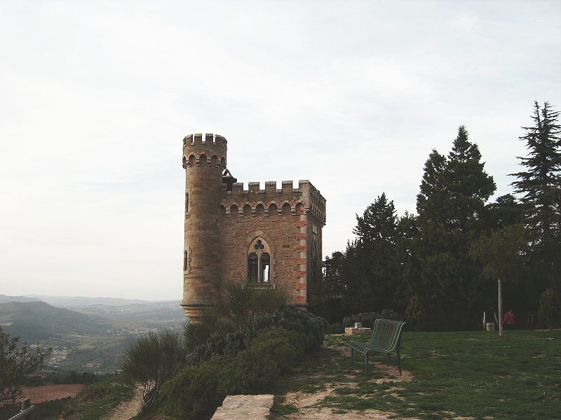 tour Magdala - Rennes-le-Château - Aude, France